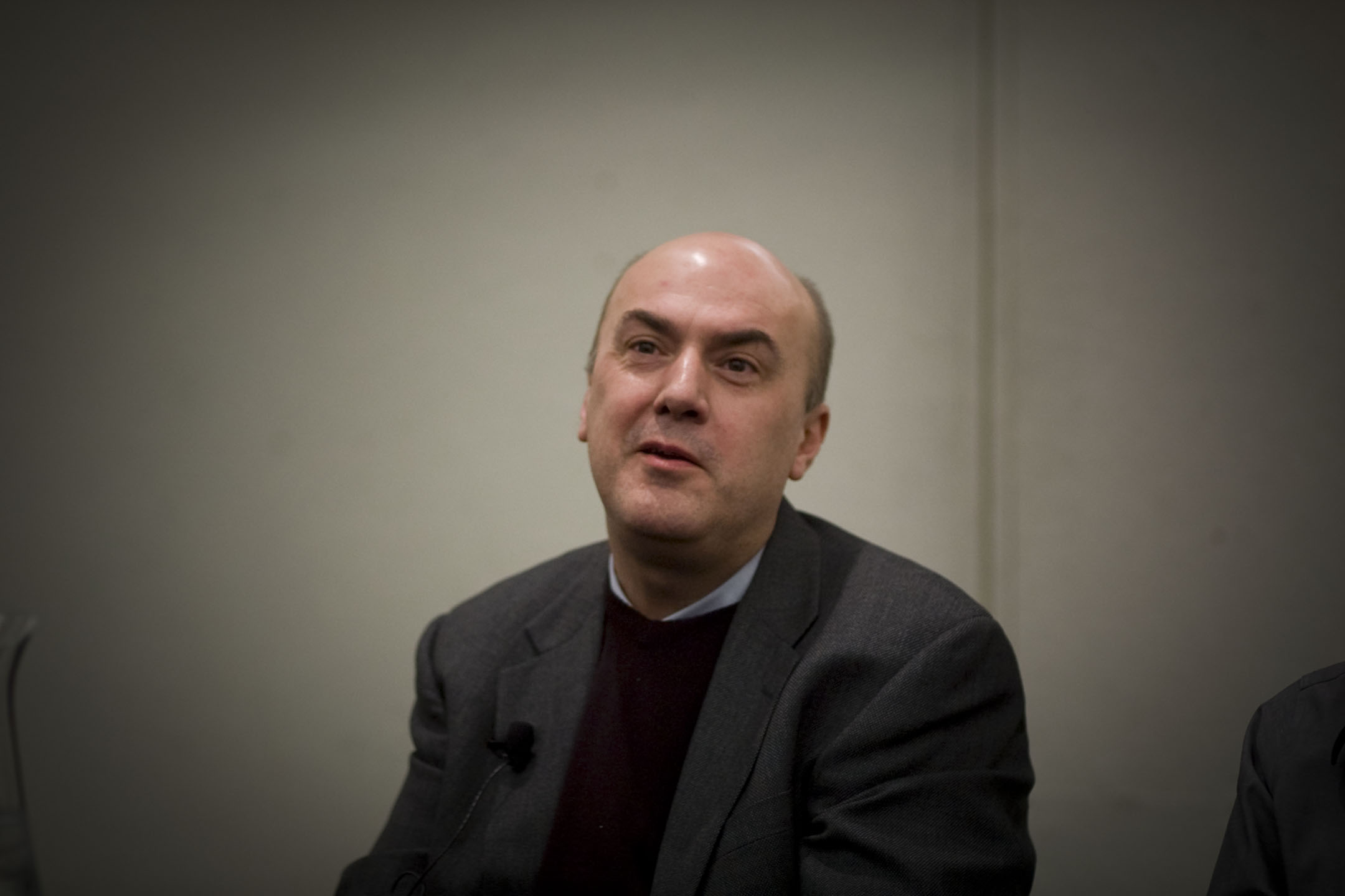 Antoine Picon